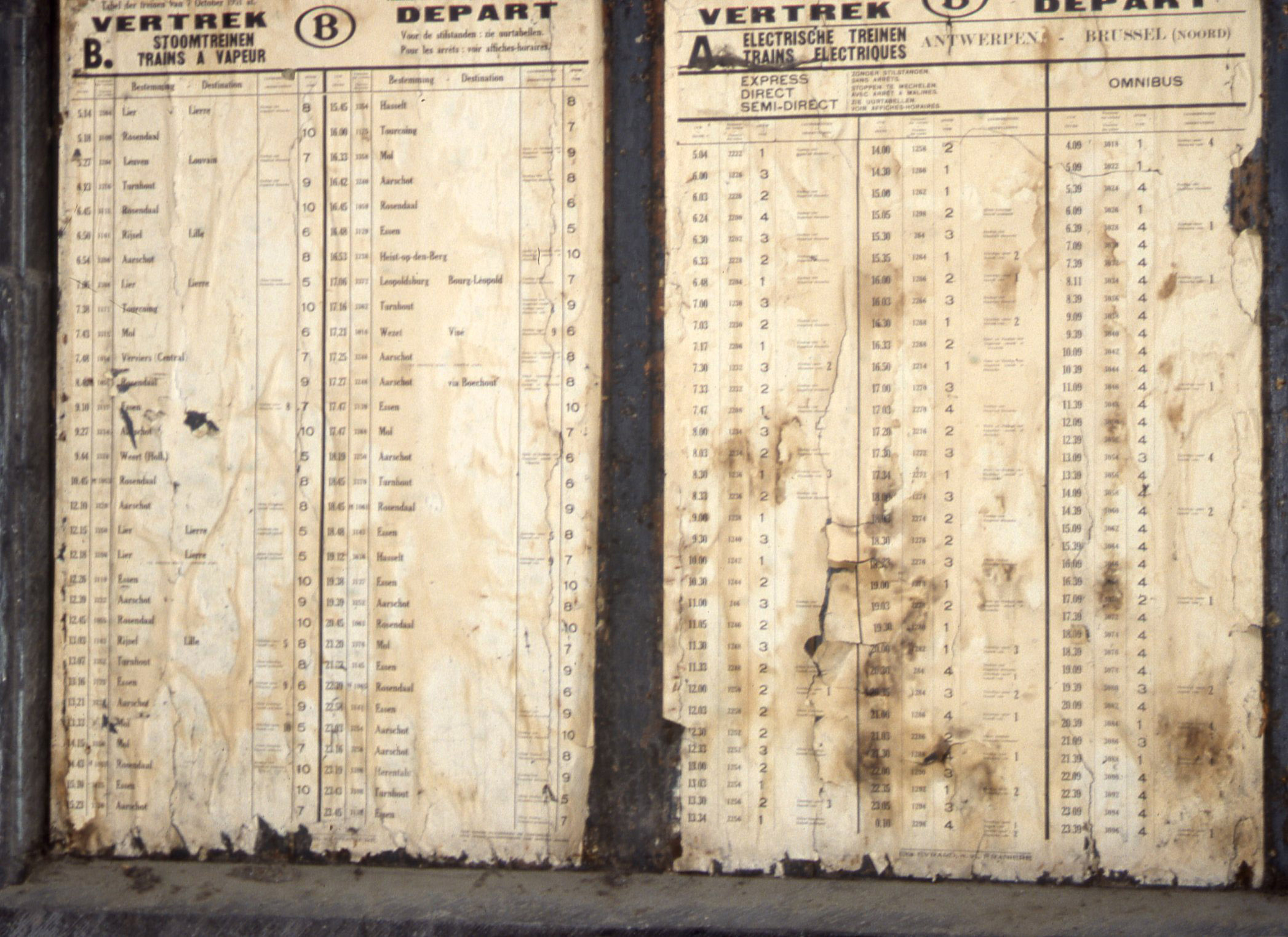 Oude vertrekstaat die tevoorschijn kwam tijdens renovatiewerkzaamheden in Antwerpen Centraal